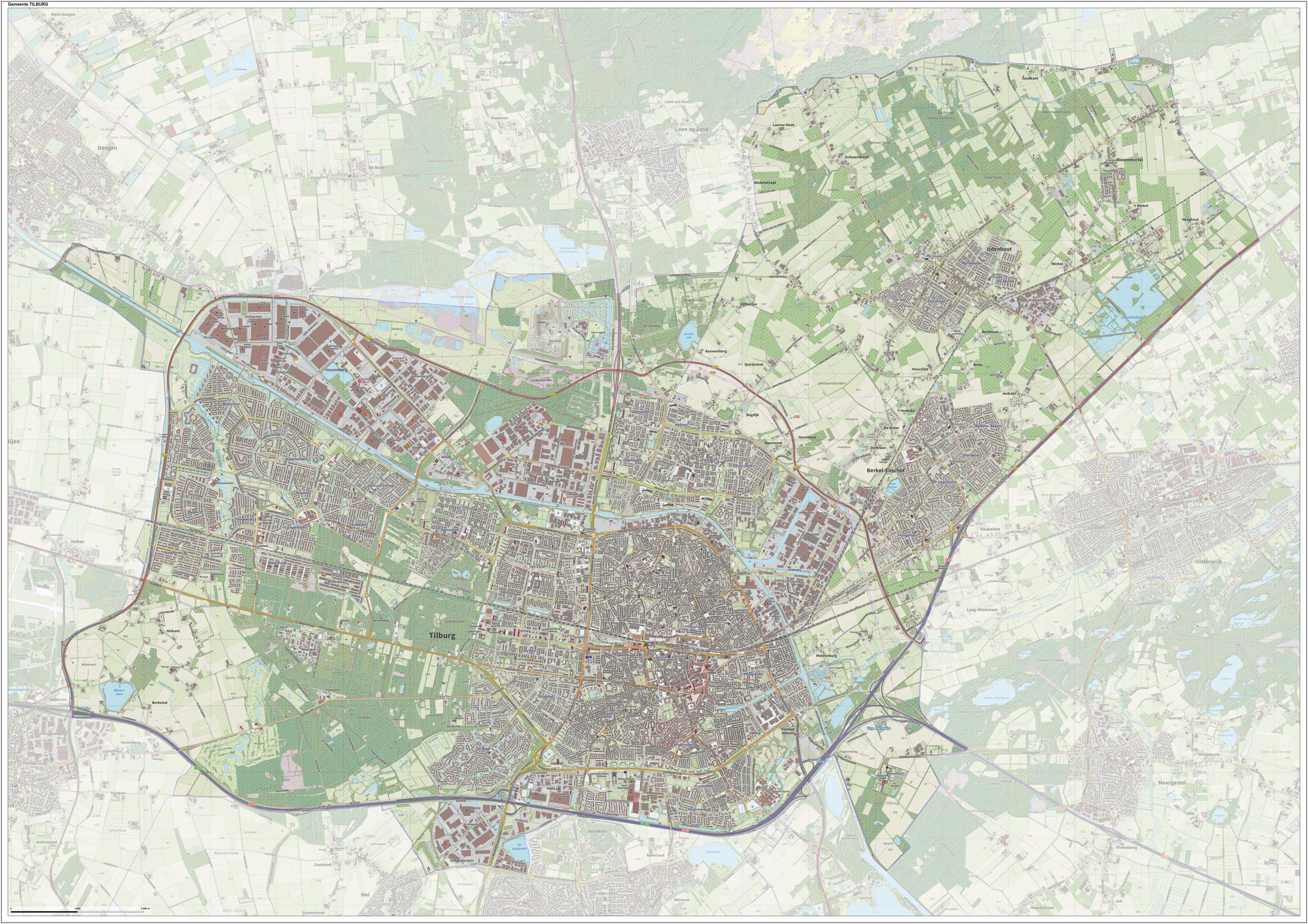 Topografische gemeentekaart. Resolutie: 400 pixels/km. Kaartbeeld samengesteld uit de open geodata van de Top10NL en Top25namen (Kadaster), Creative Commons-BY licentie. Gebouwvlakken uit open geodata BAG extract. Wegen uit de OpenStreetMap, OpenStreetMap community. Reliëfschaduw uit de Actuele Hoogtekaart AHN2. Samenstelling en kleurenschema: Jan-Willem van Aalst, met QGIS. Zie ook de Legenda.